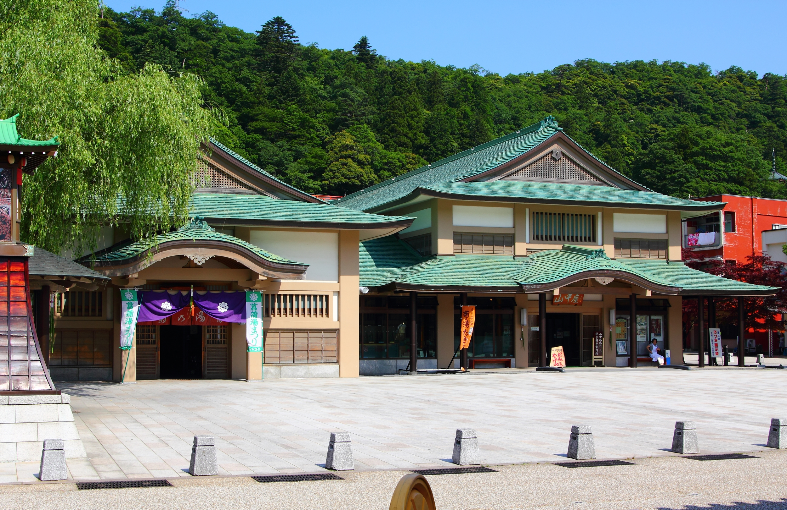 山中温泉、山中座（石川県）